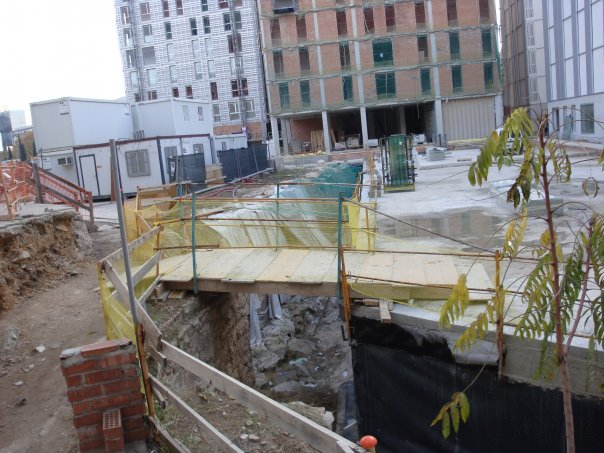 Baluard de Migdia 2009